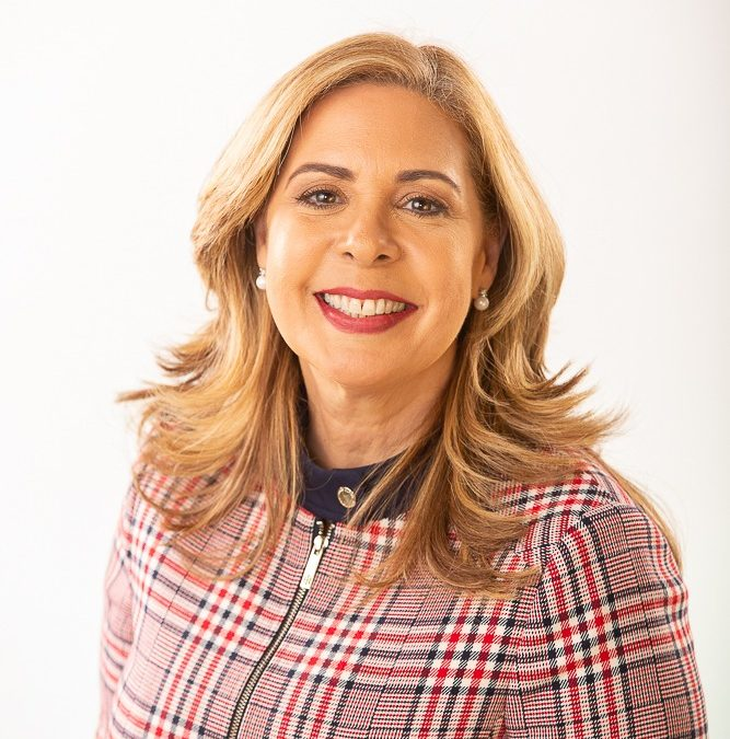 Sergia Elena de Seliman